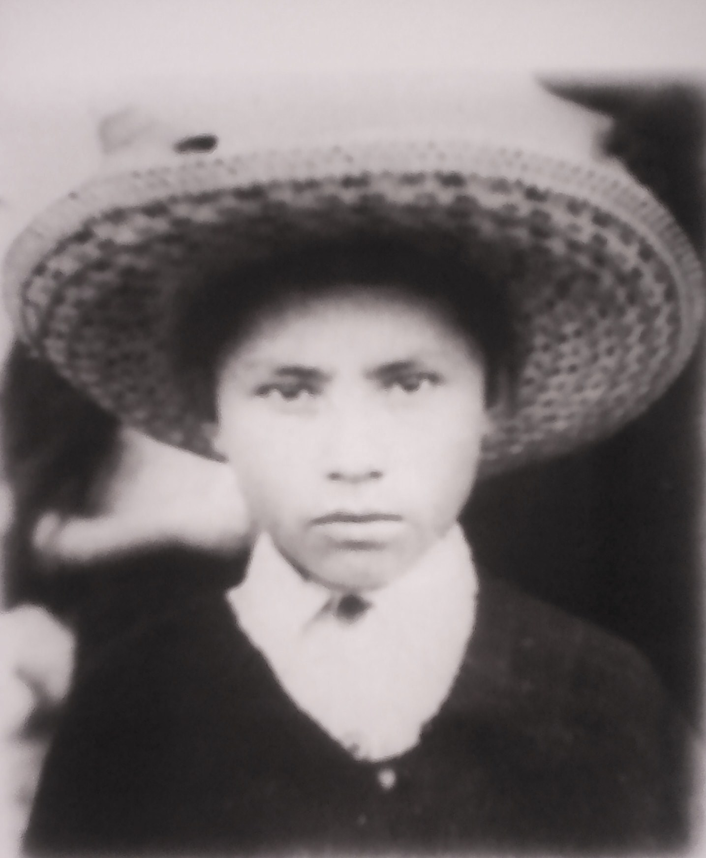 Niño muisca fotografiado por Luis Benito Ramos en 1935, en el departamento de Boyacá.